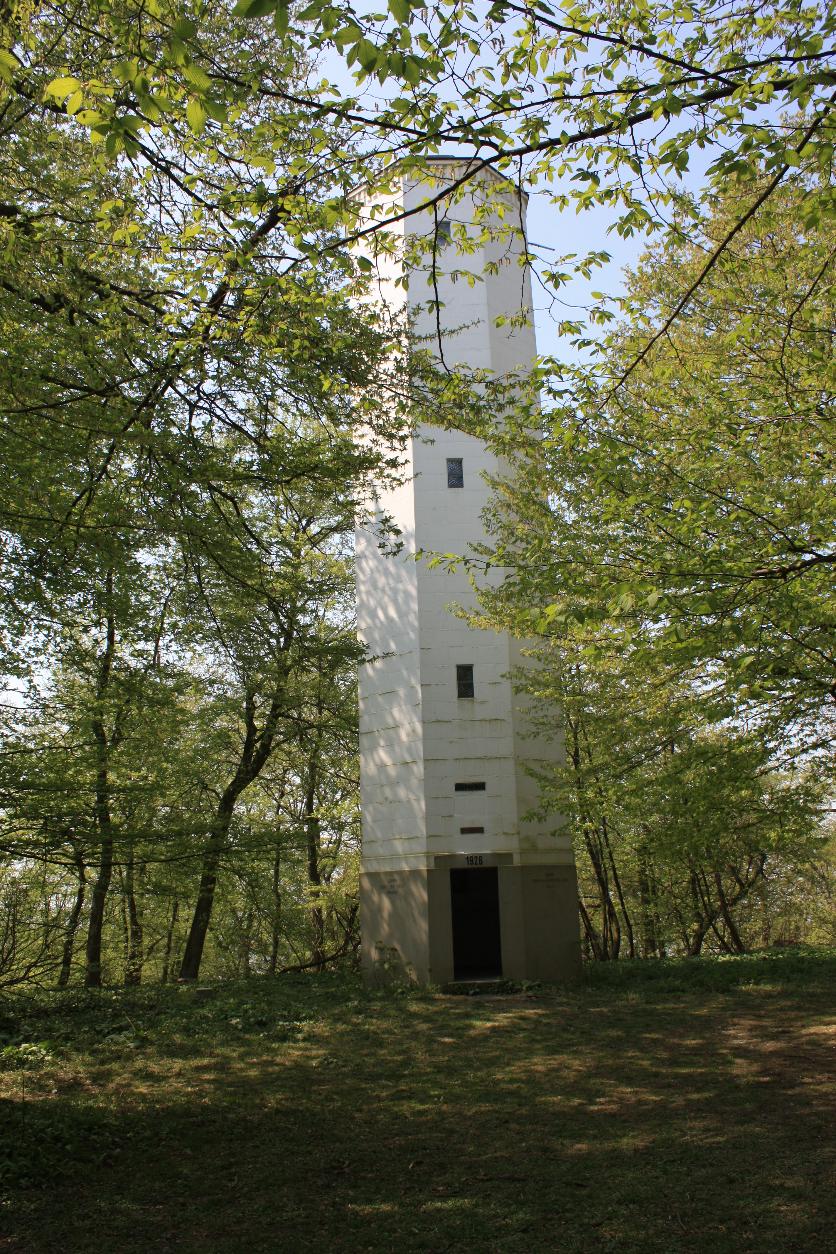 Ansicht des "Ernst-Binnewies-Turm" auf der "Hohen Tafel" in den "Sieben Bergen" Nähe Alfeld/Leine